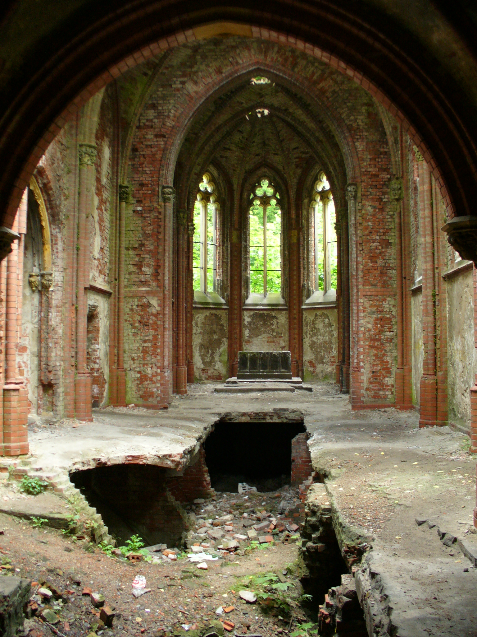 Zrujnowana kaplica pałacowa w Kopicach